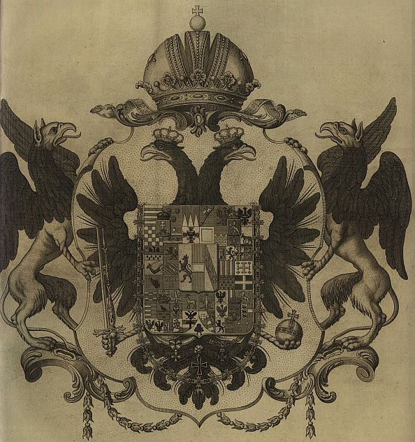 I. Ferenc császár 1806-os nagycímere